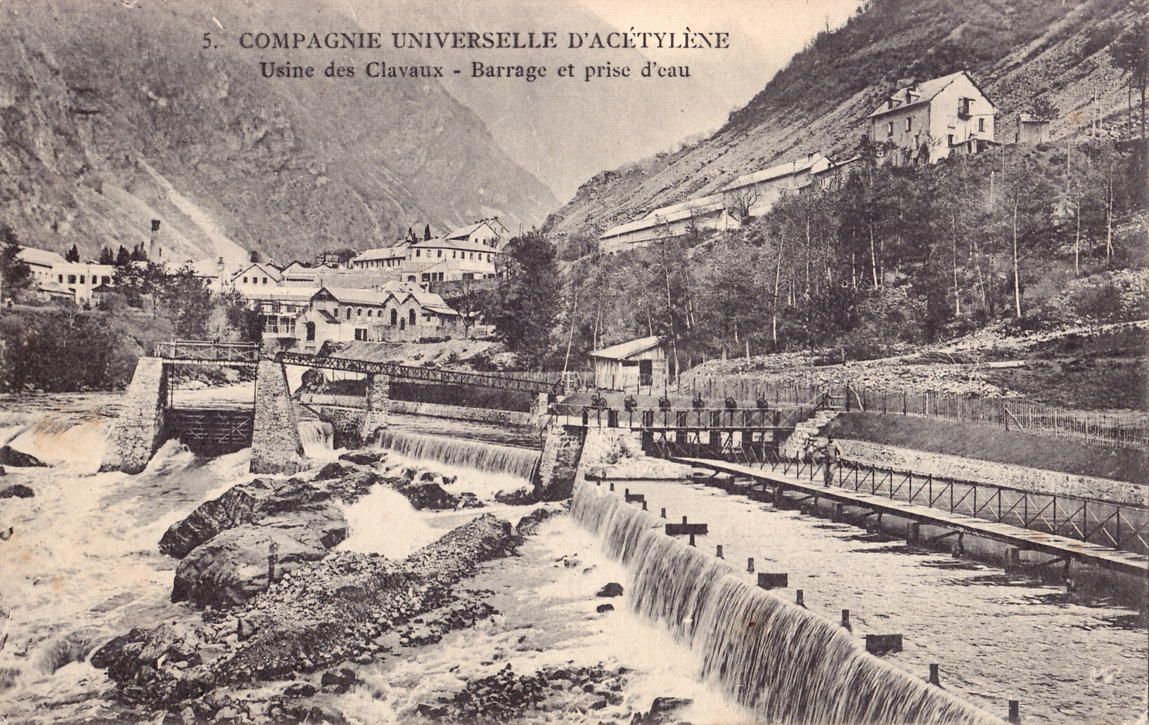 Carte postale ancienne éditée par